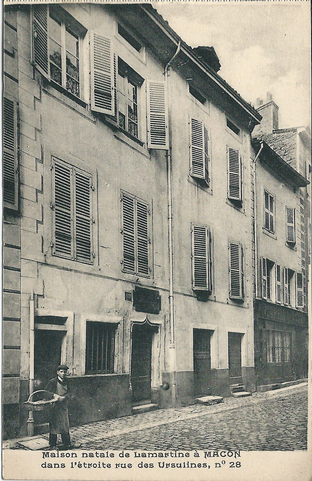 Souvenirs autour du poète Alphonse de Lamartine